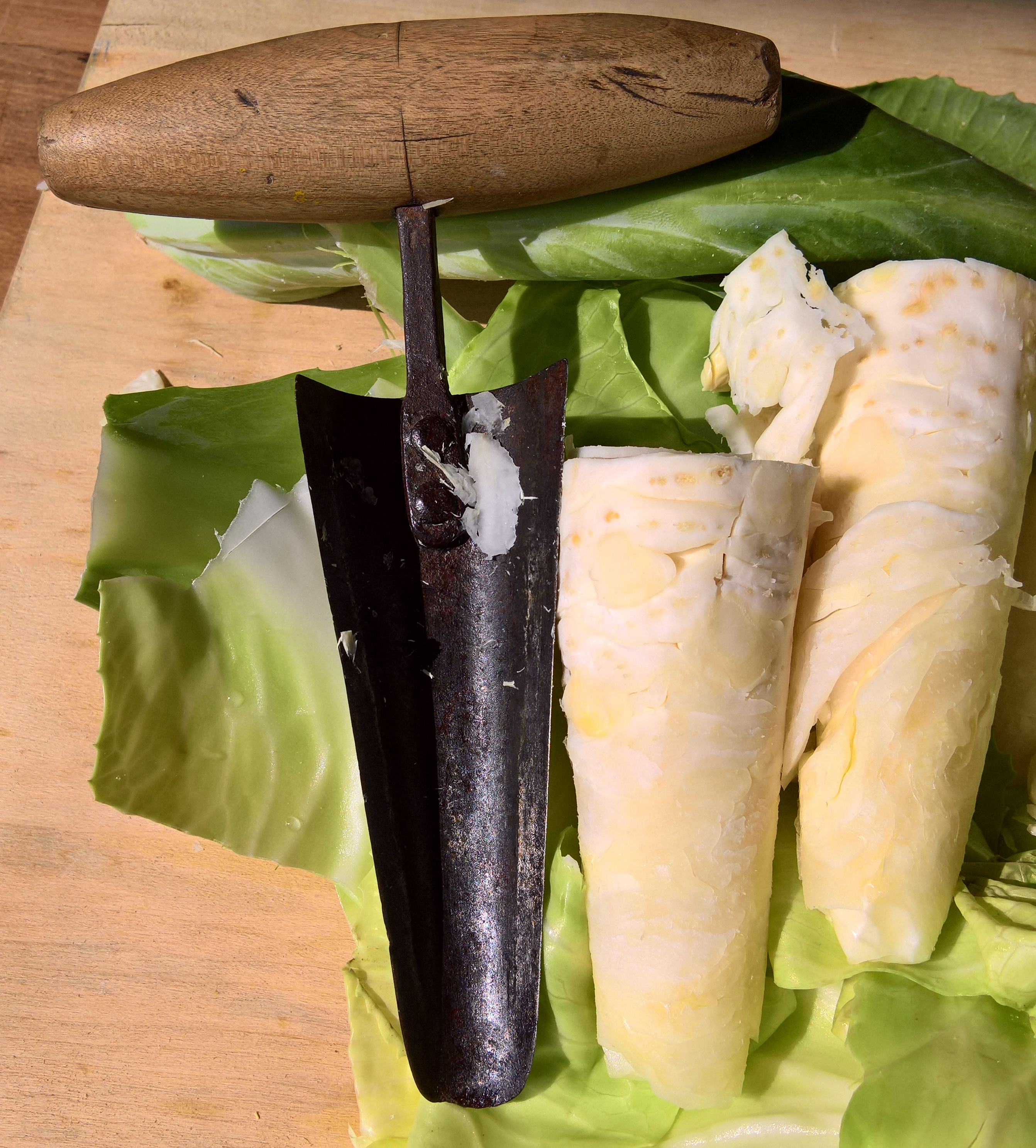 Ein Strunkschneider, der den Strunk, besonders von Kohlarten durch spiralförmiges Hineindrehen abtrennt. Der Durchmesser wird über die Eindringtiefe und angesetztem Winkel bestimmt. Daneben rechts im Bild zwei herausgedrehte Strunkteile des Weißkohl. Im Umstädter Stadtmuseum Gruberhof beim jährlichen Brauchtumsfest in Aktion.